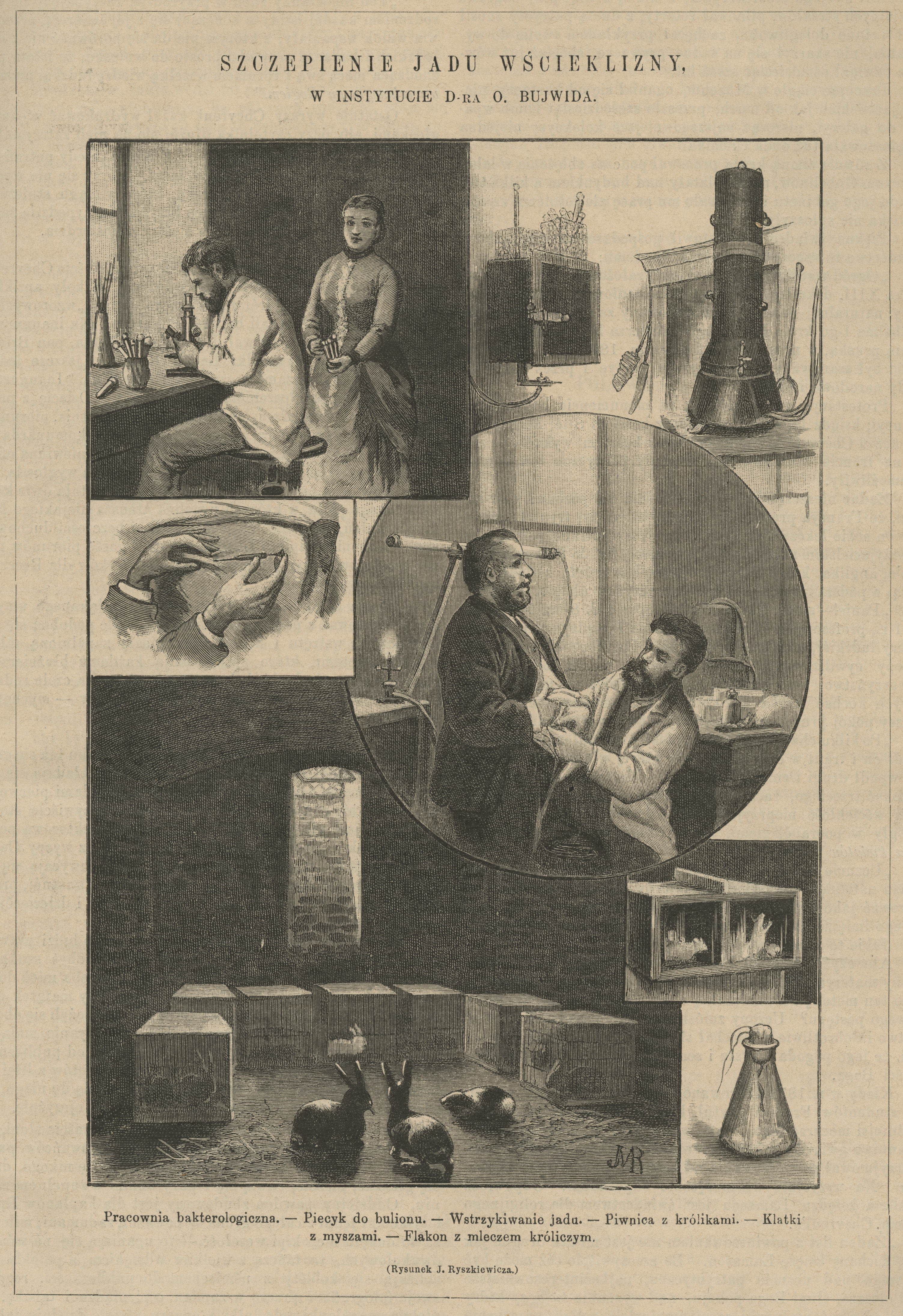 Szczepienie jadu wścieklizny w Instytucie D-ra O. Bujwida